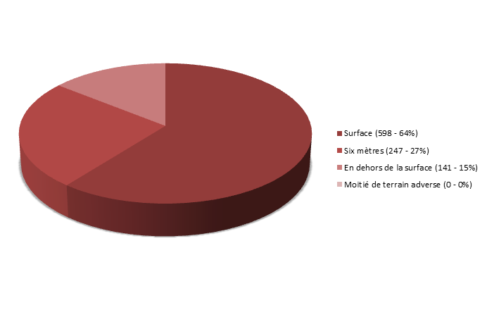 Statistiques illustrant le nombre de buts par zone de jeu durant la saison 2011-2012 du championnat de Ligue 1